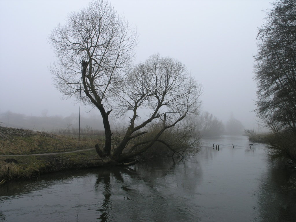 Seret poblyzu Ternopolja / Seret near Ternopil